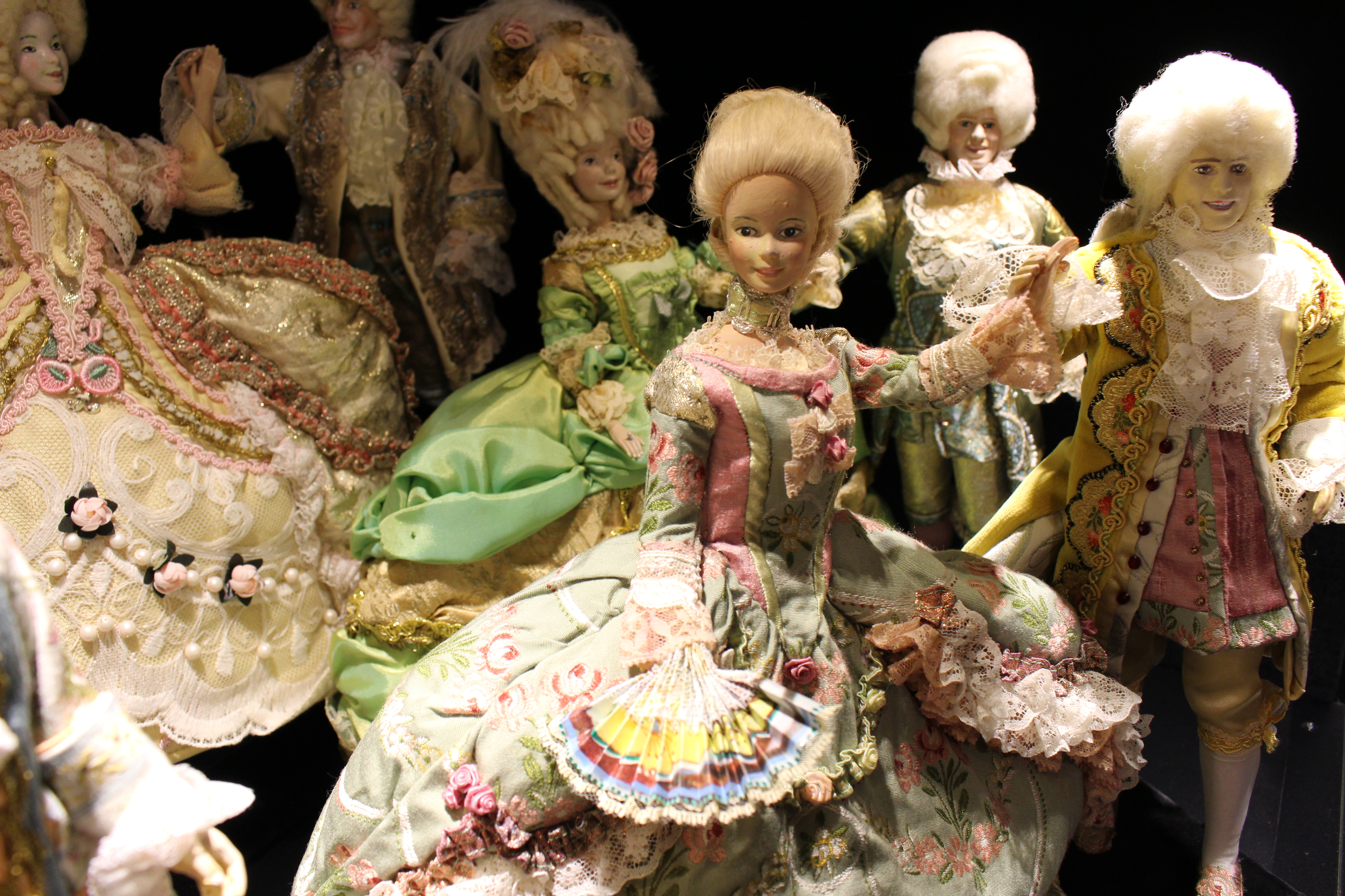 Die Ausstellung "Mode-Reigen durch fuenf Jahrhunderte" wurde von Ilse Wolf gefertigt. Urheberrecht bei Ilse Wolf. Bilddatei von Katja Morrison The Exhibition "Mode-Reigen durch fuenf Jahrhunderte" has been made by Ilse Wolf, all rights reserved. Picture by Katja Morrison